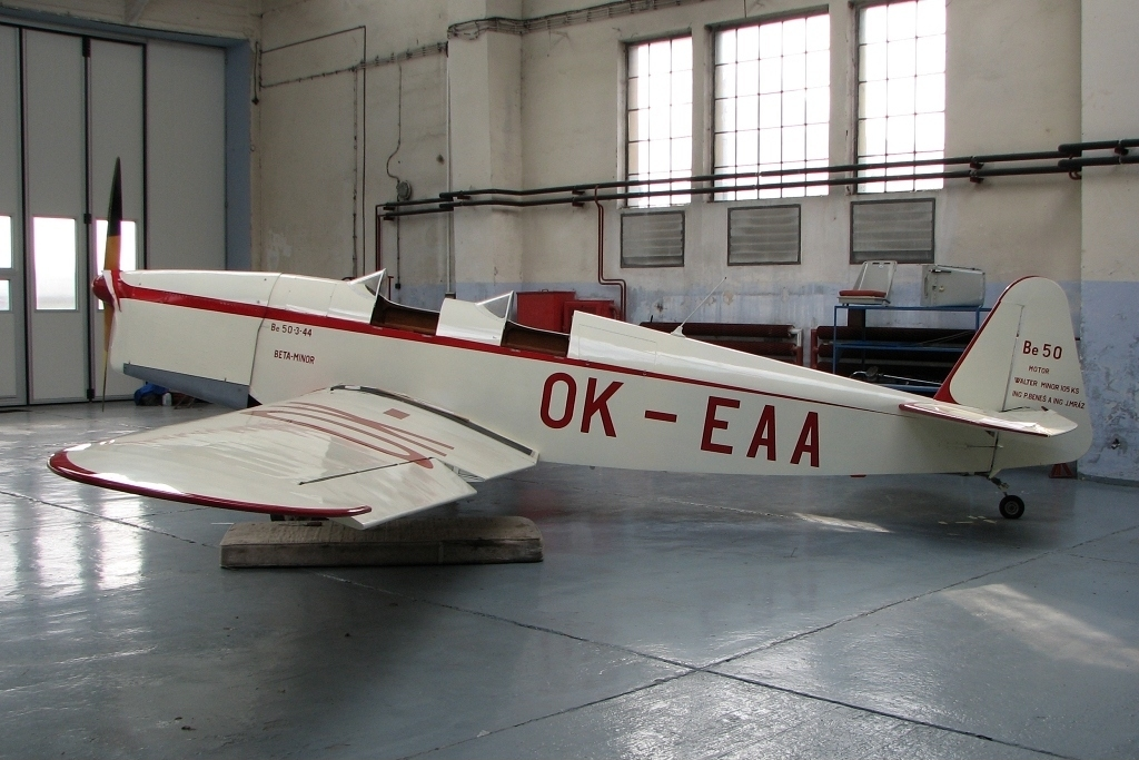 B-50 Beta Minor. Probíhající renovace letounu z roku 1935 (Jan Klaban)